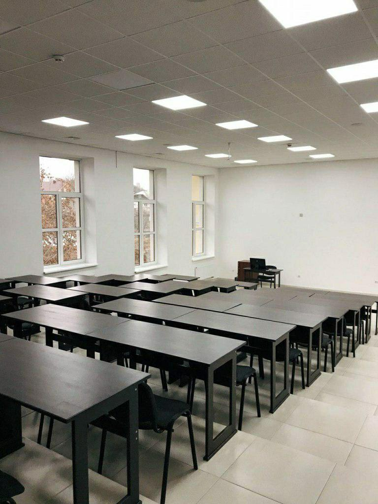 Навчальна авдиторія в новому корпусі Острозької академії